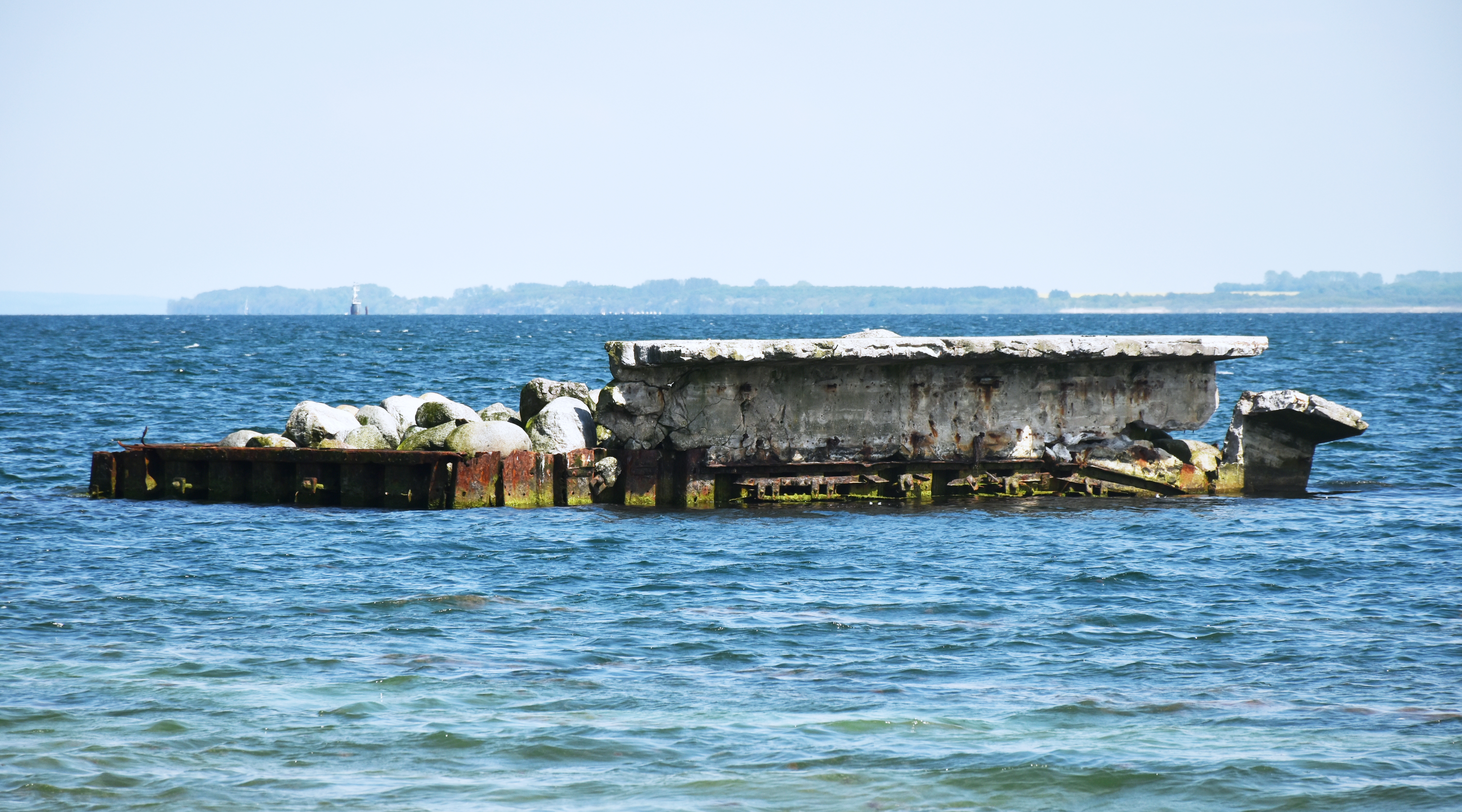 Überresten von der Erprobungsstelle Tarnewitz